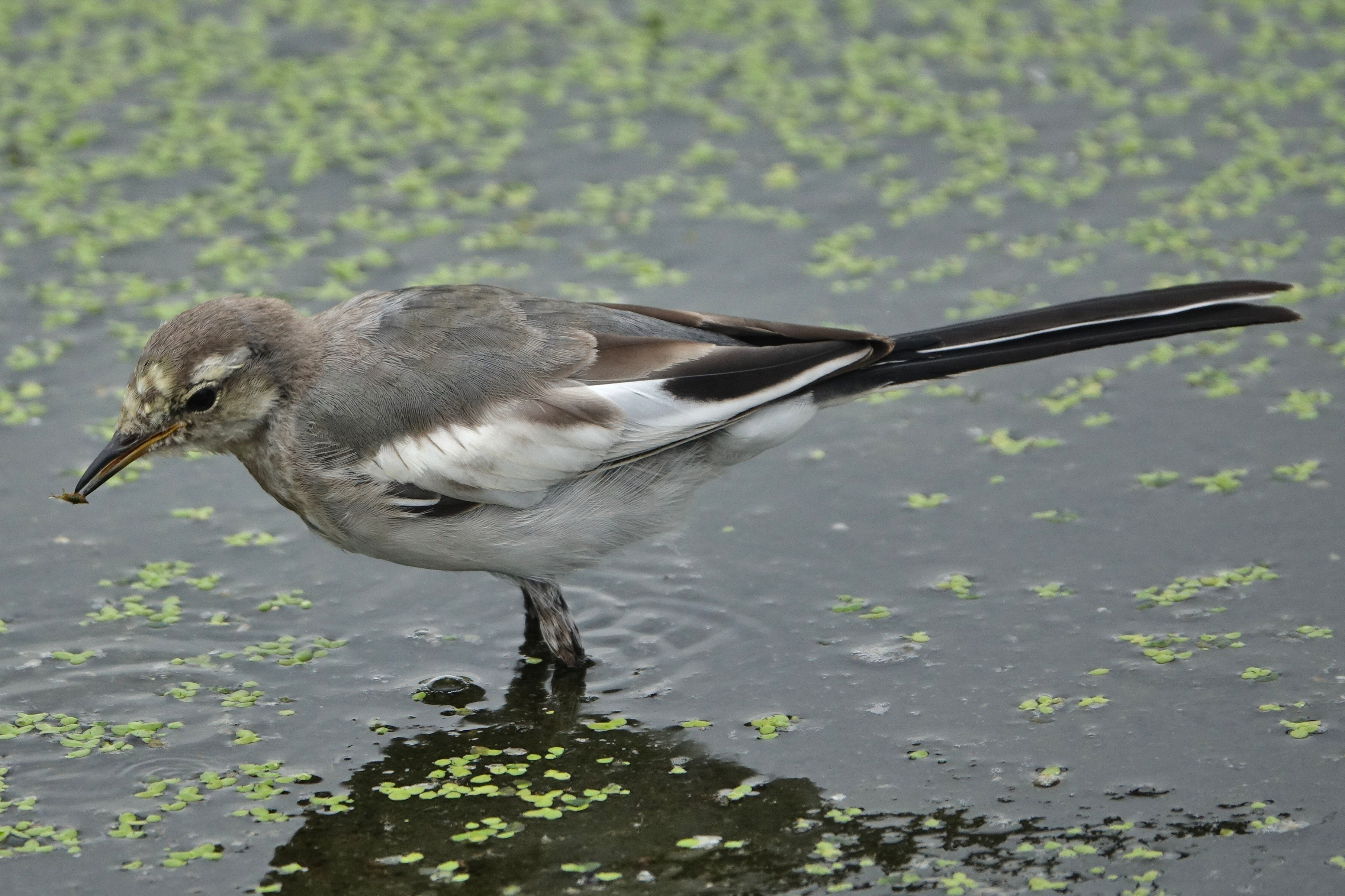 虫を食べるハクセキレイの幼鳥 日本東海地方